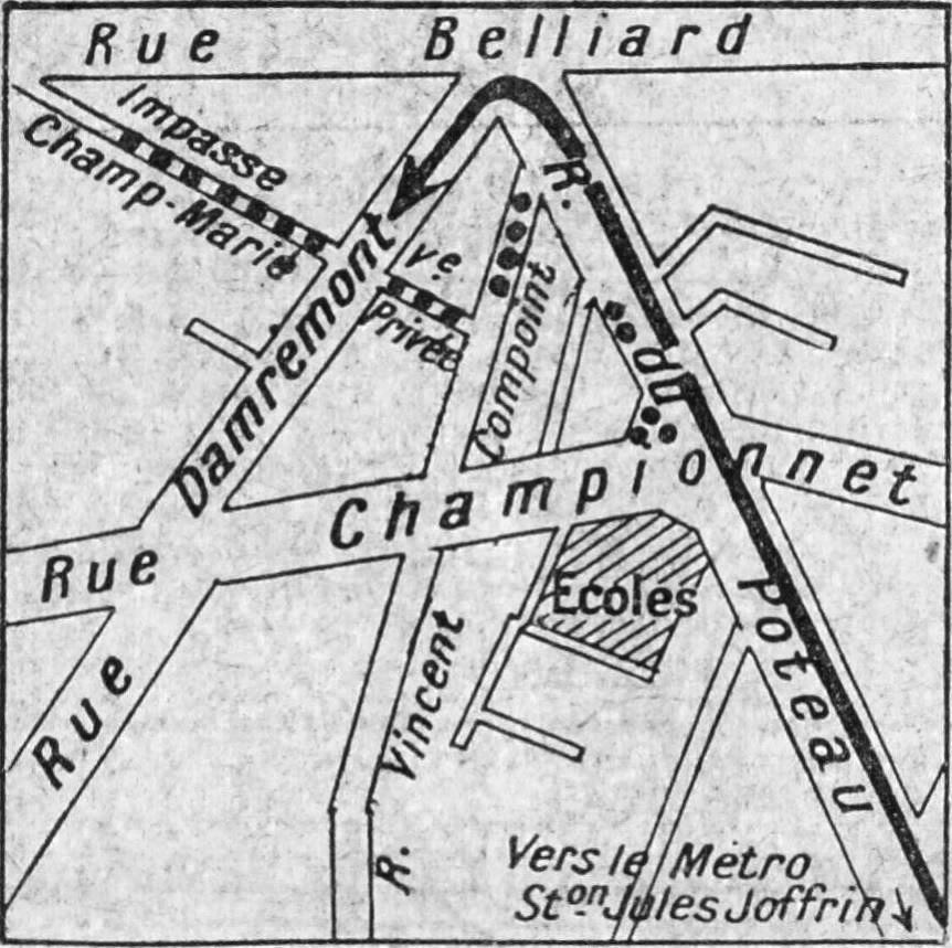 "Carte du lieu de l'attentat. La ligne noire indique le chemin que suivirent les "Jeunesses patriotes". Les pointillés indiquent les coins de rues où étaient massés les communistes armés de revolvers et prêts au guet-apens."